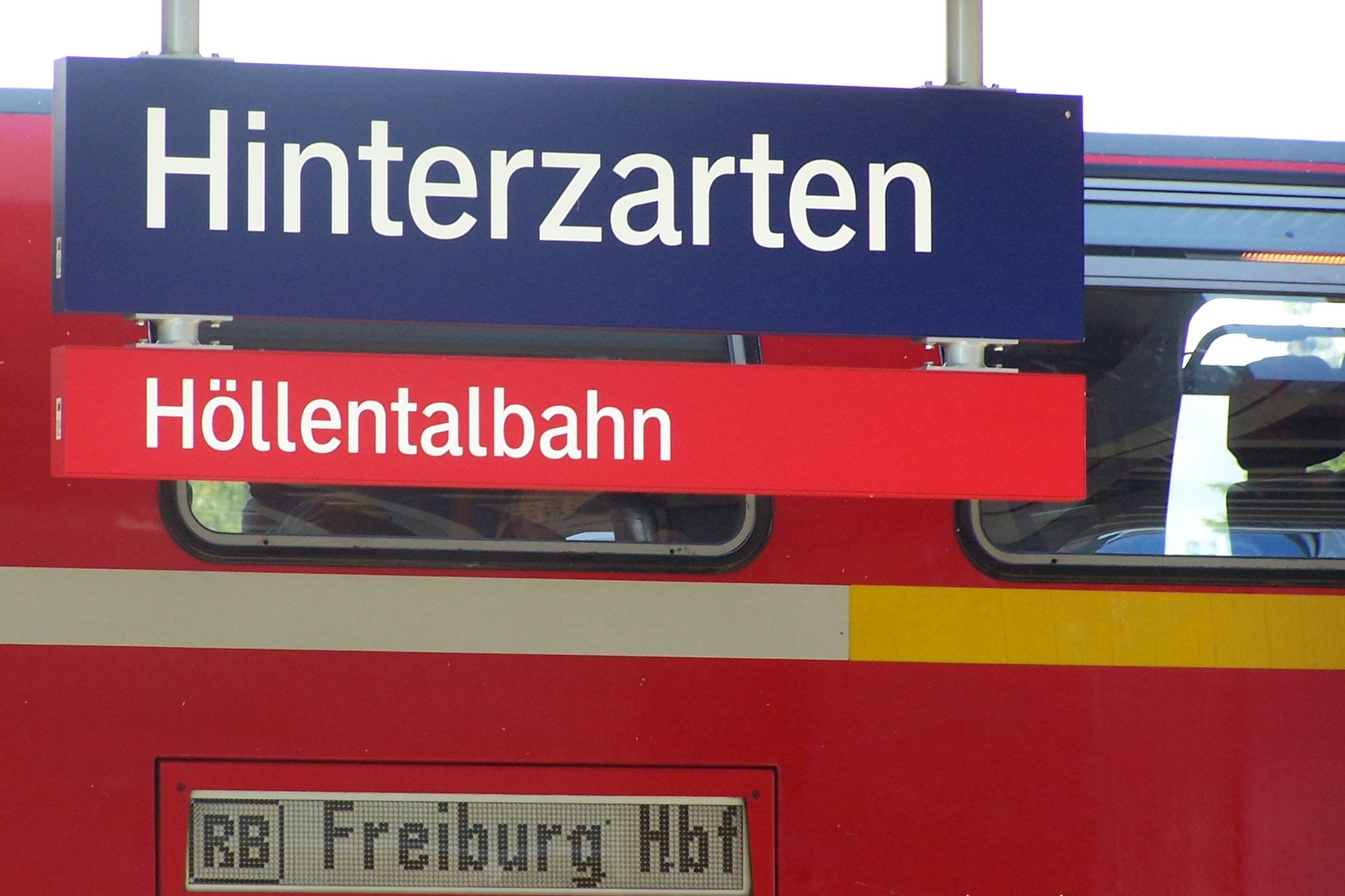 Stationsschild Hinterzarten mit dem Zusatz "Höllentalbahn"